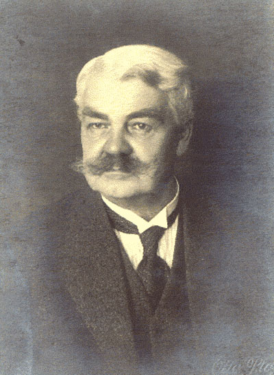 Der Autor Richard Skowronnek (* 1862, + 1932)